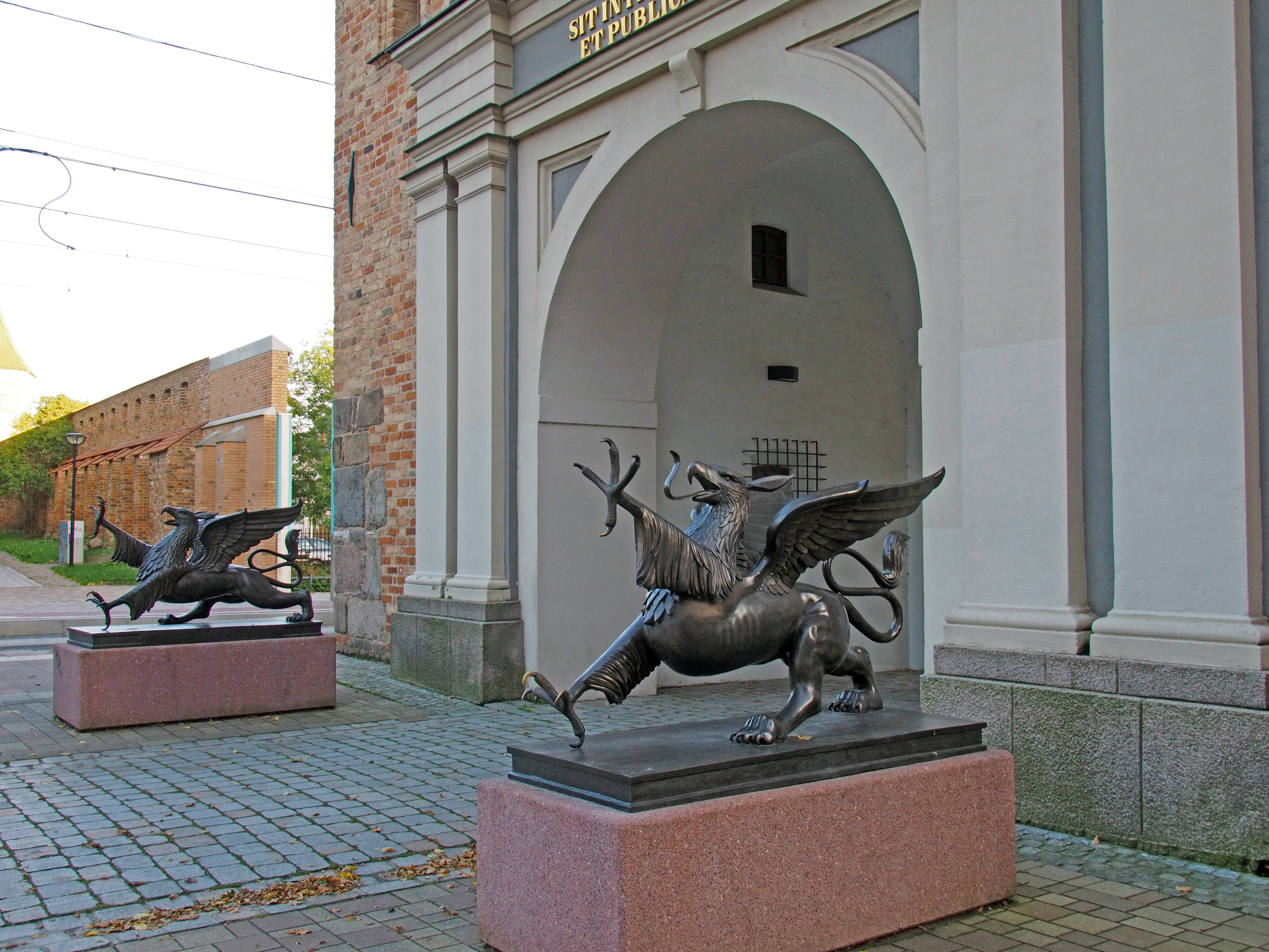 Zwei Greife vor dem Rostocker Steintor (Stadtseite), Bronzeplastiken des Künstlers Ene Slawow – Der Greif ist das Wappentier von Rostock